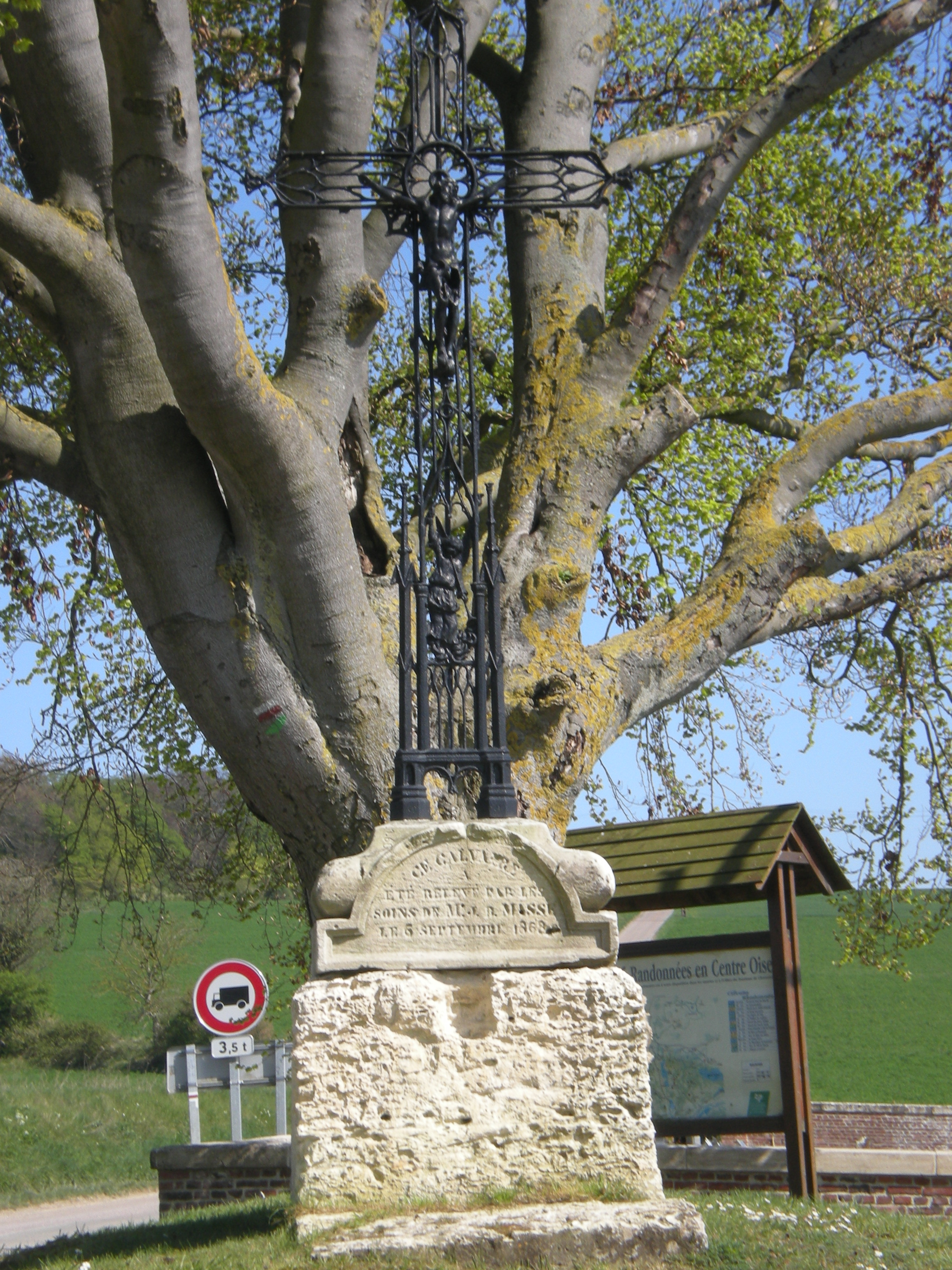 croix de lamécourt